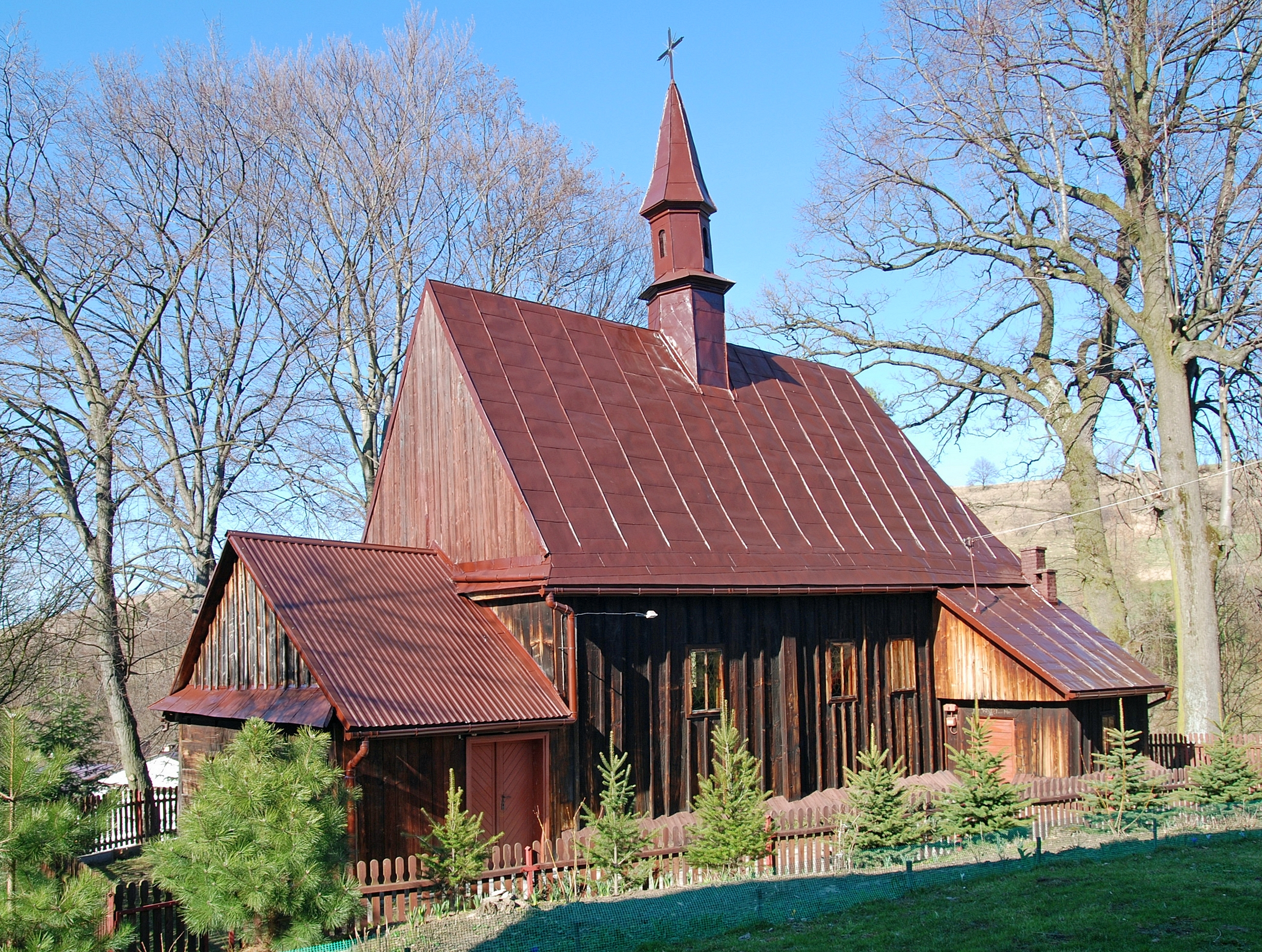 wieś Krzywe (powiat brzozowski)